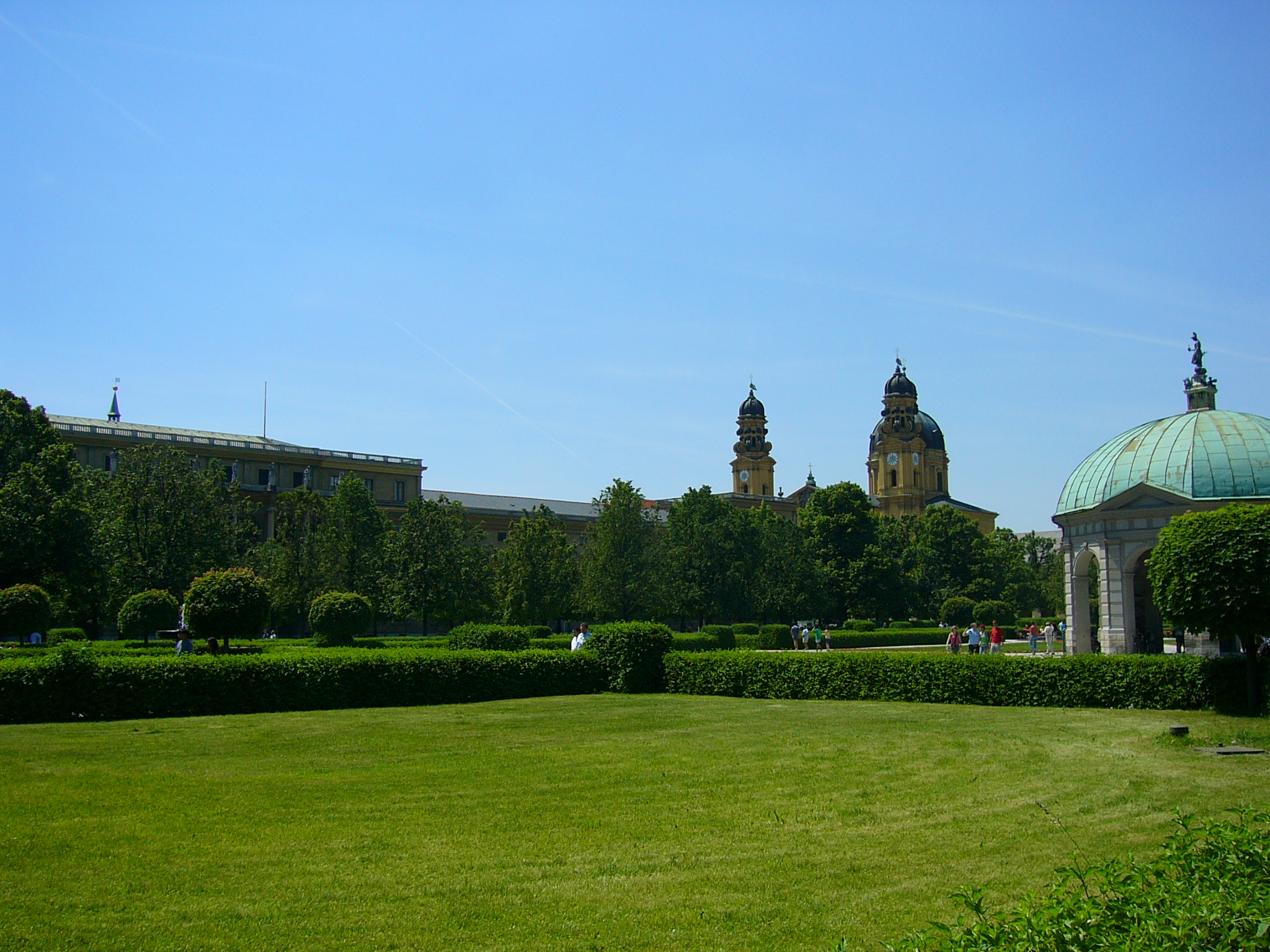 Der Münchner Hofgarten, nach Westen hin gesehen